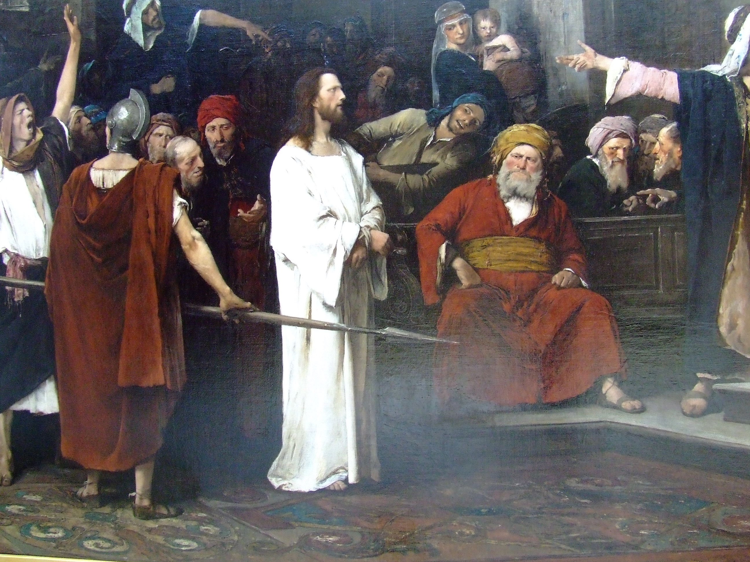 Munkácsy Mihály: Krisztus Pilátus előtt (részlet)